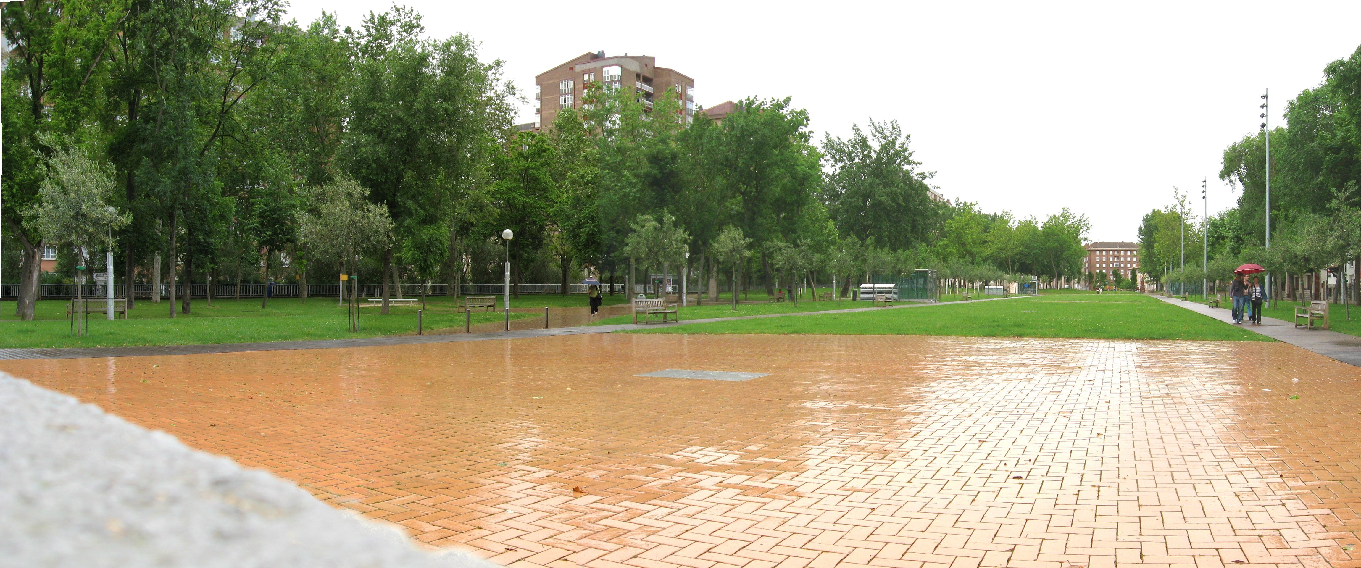 Parque del polvorín viejo en el barrio de Judizmendi